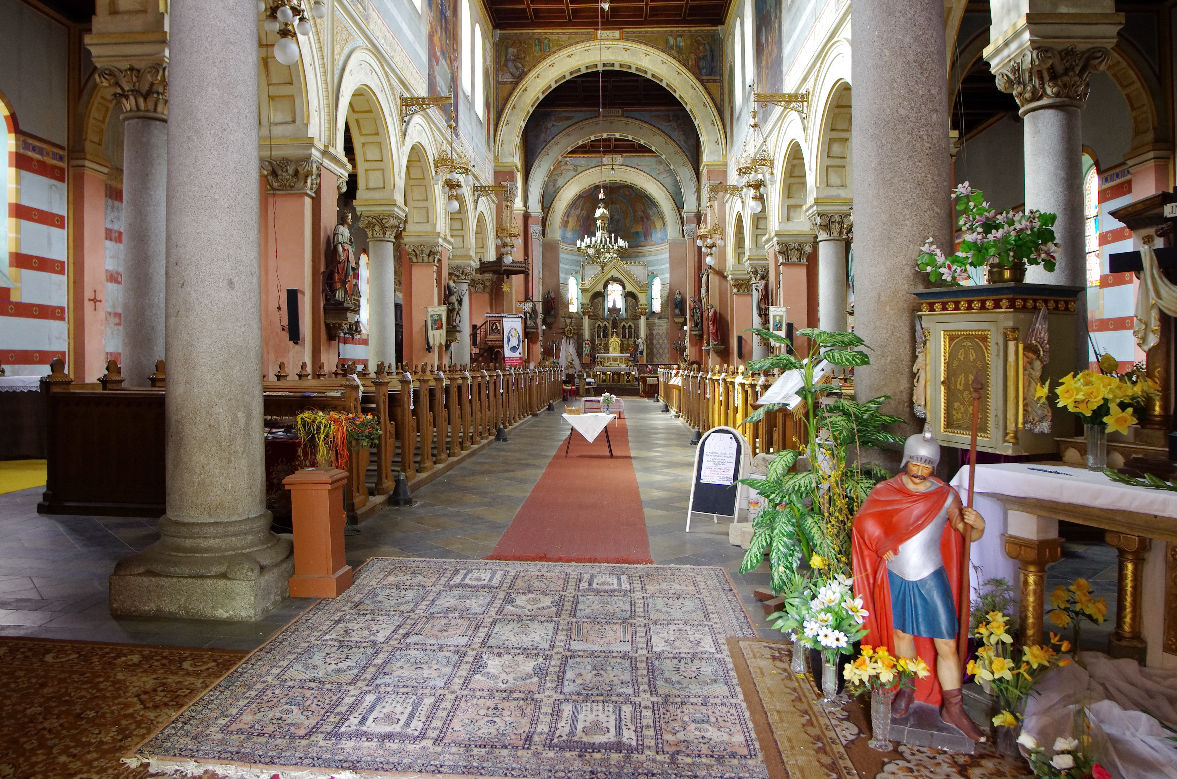 Kostel Nejsvětější svátosti oltářní, Kraslice, Kraslice (okres Sokolov).